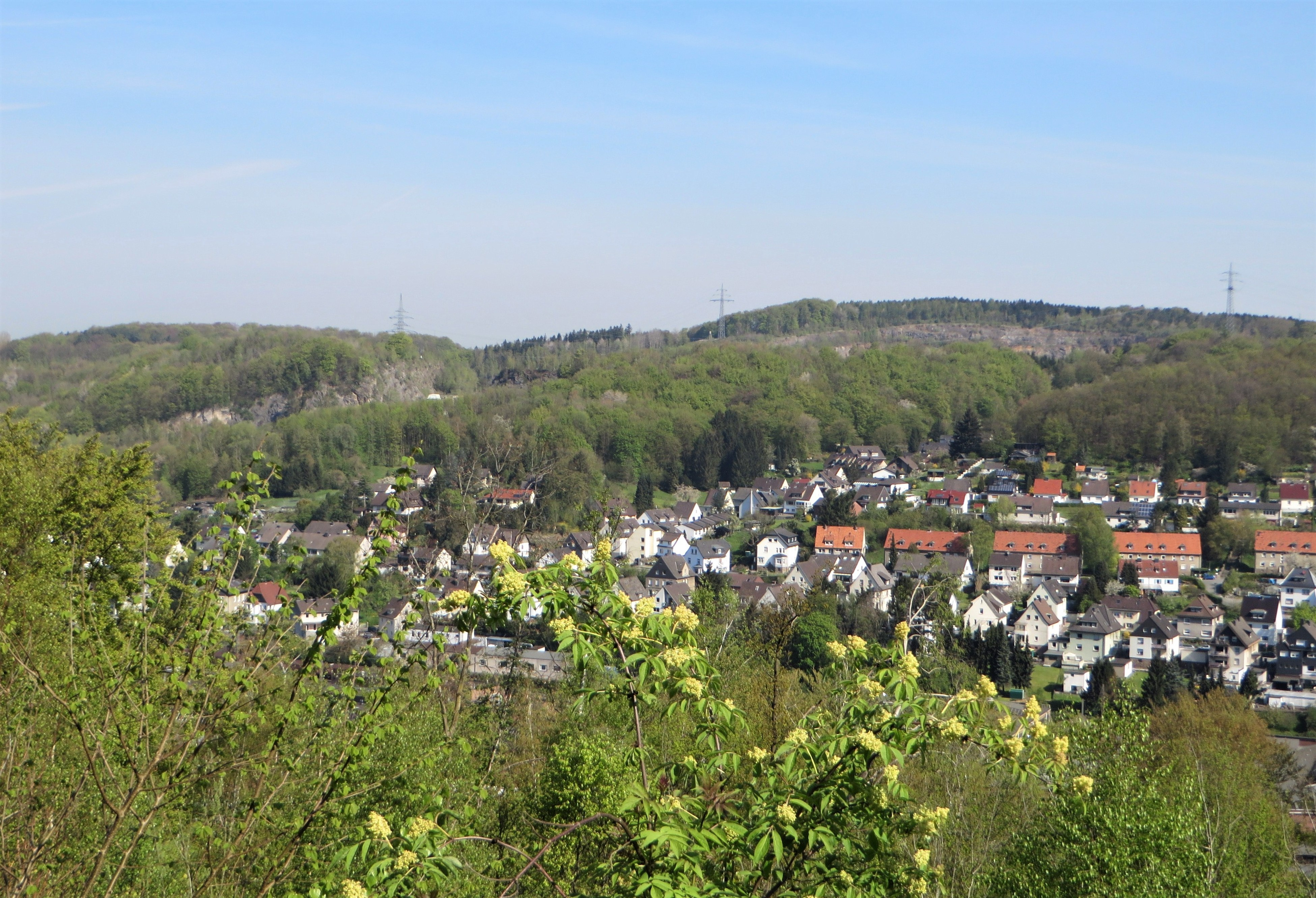 Blick von der Wilhelmstraße auf das Lennetal mit dem Ortsteil Oege in Hagen-Hohenlimburg. Es sind Feldstraße, Oststraße, Piepenstockstraße und „Am Sonnenberg“ zu sehen. Das Waldgebiet oberhalb der Häuser, mit den Steinbrüchen der Hohenlimburger Kalkwerke und dem Steltenberg (257 m), liegt im Landschaftsschutzgebiet „Steltenberg, Oege“. Am südwestlichen Randbereich des Steinbruchs im Massenkalk des Oberen Mitteldevons befindet sich der geschützte Landschaftsbestandteil „Steinbruch Steltenberg“. Es handelt sich um einen Kalktrockenrasen sowie um die anschließenden Steilwände der Abgrabung und um angrenzende Gehölzbestände.